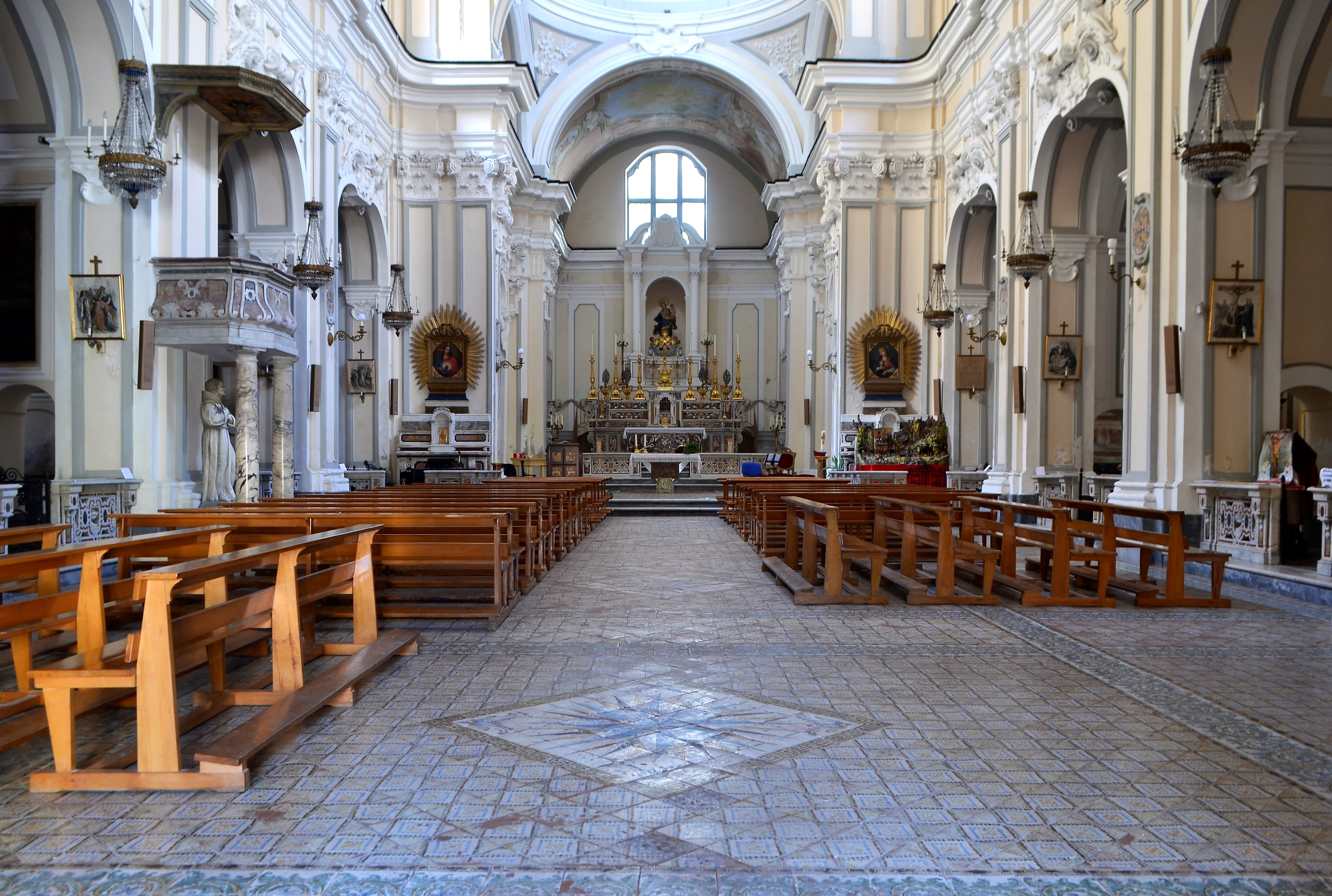 Navata e altare maggiore di scuola fanzaghiana.